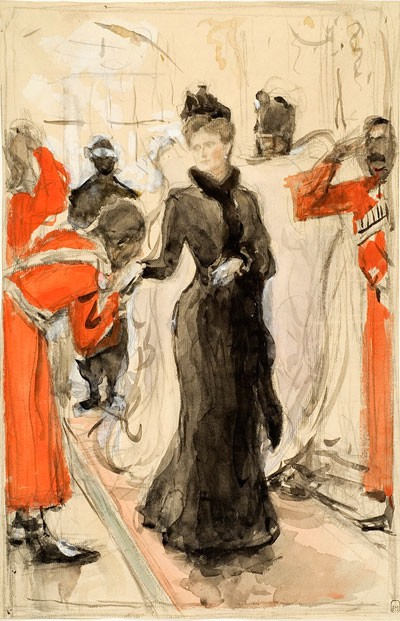 Выход императрицы Александры Федоровны. Рисунок В. Серова. ГРМ